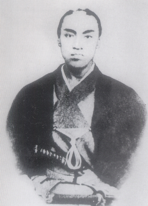 小松帯刀 Komatu Tatewaki.修正された写真である。